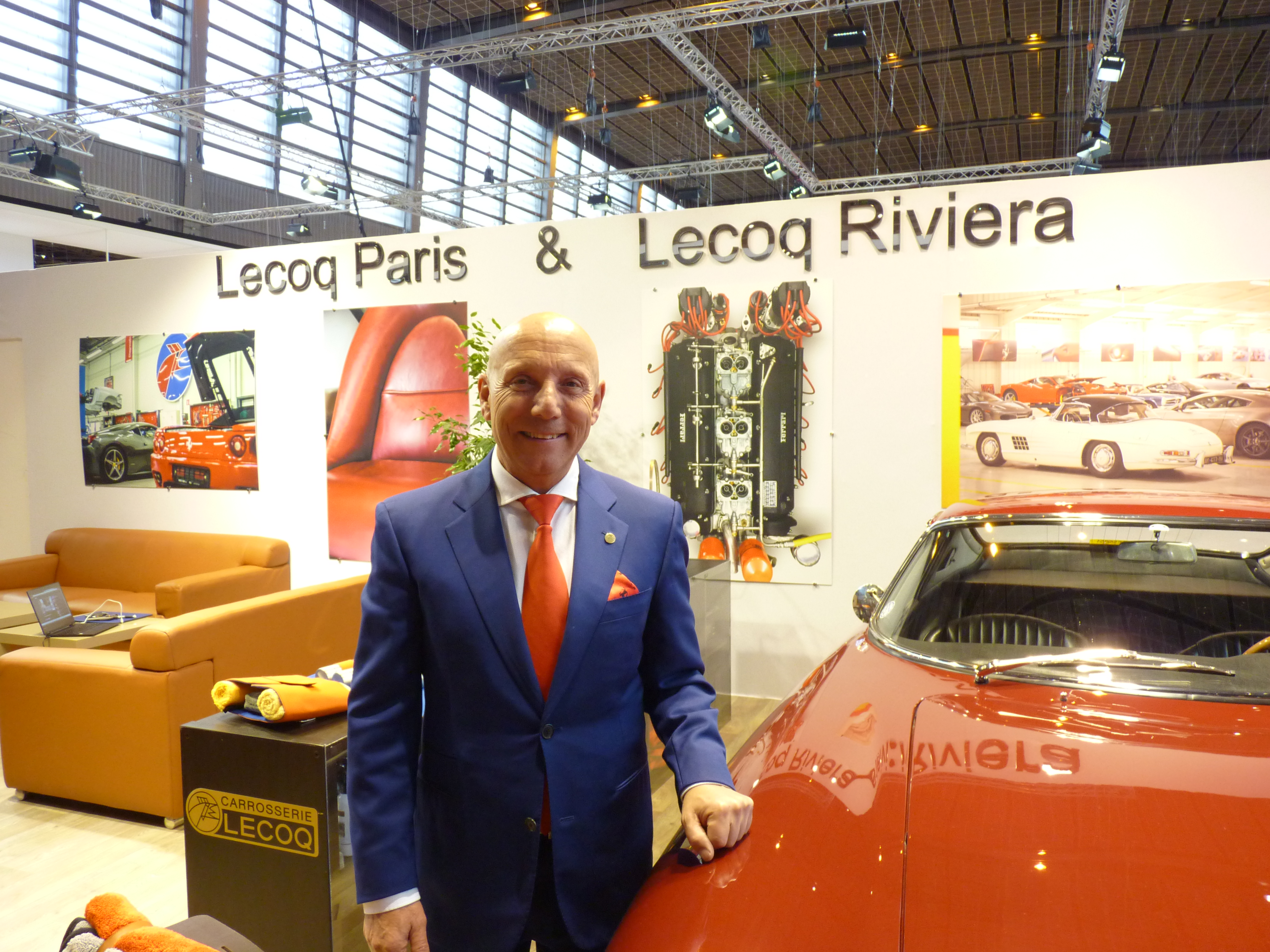 Rétromobile 2018 Max Alunni - Carrosserie Lecoq